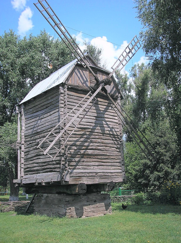 Windmills in Village Prelesne. Ukraine. Donetsk region.